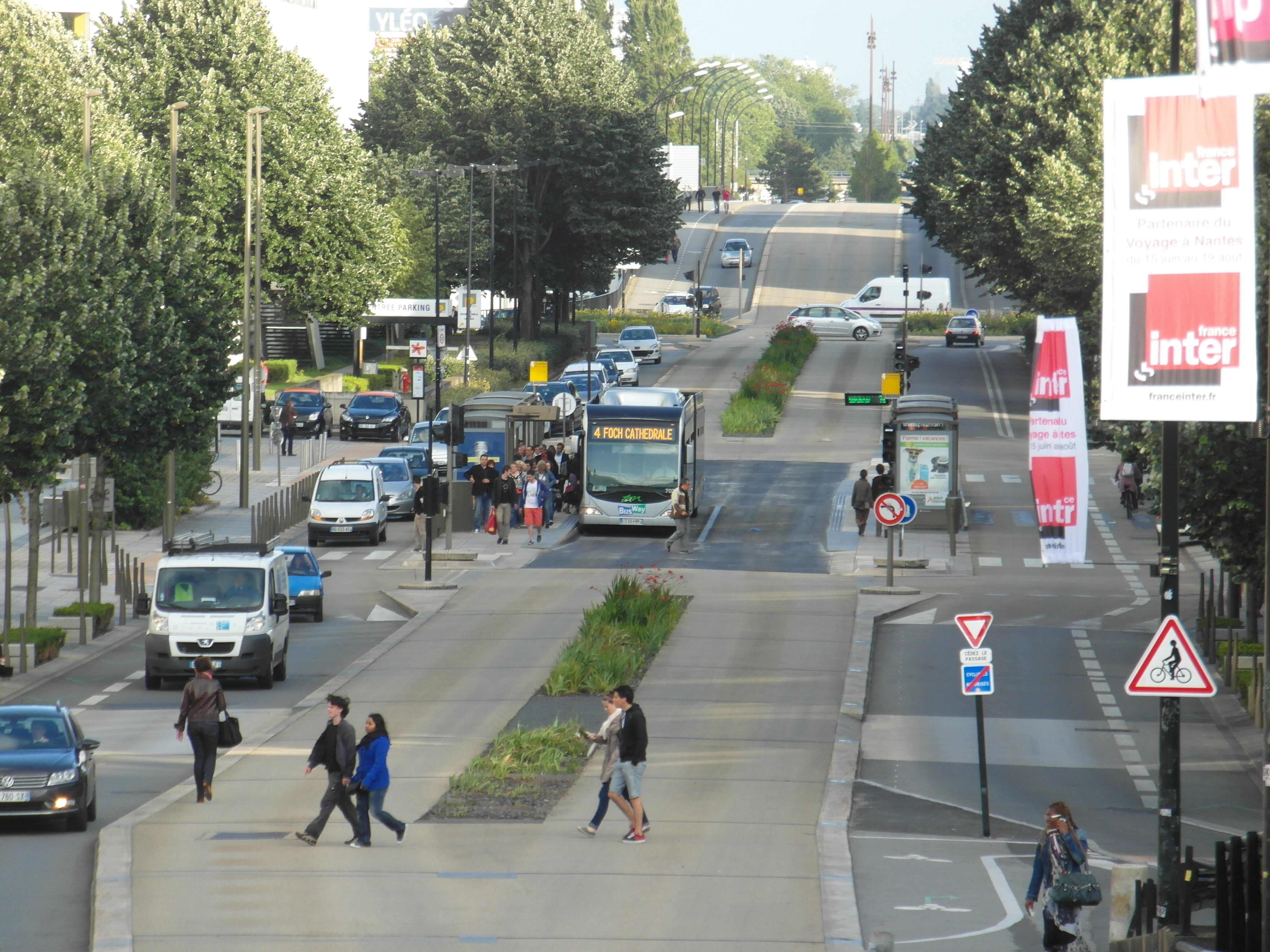 Bus à haut niveau de service - Bus Rapid Transit - Bussystem auf Eigentrasse